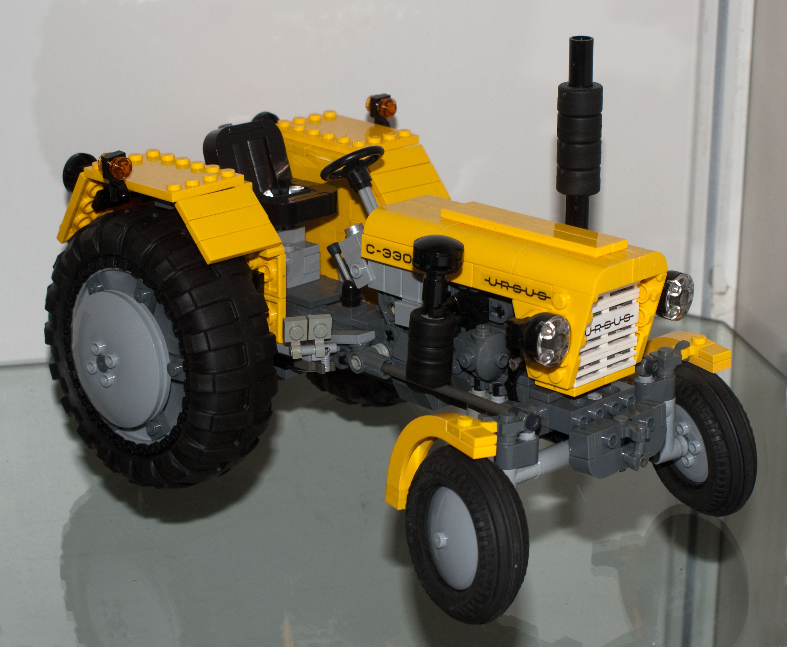 Traktor Ursus C-330 - model LEGO. Muzeum Techniki, Warszawa.